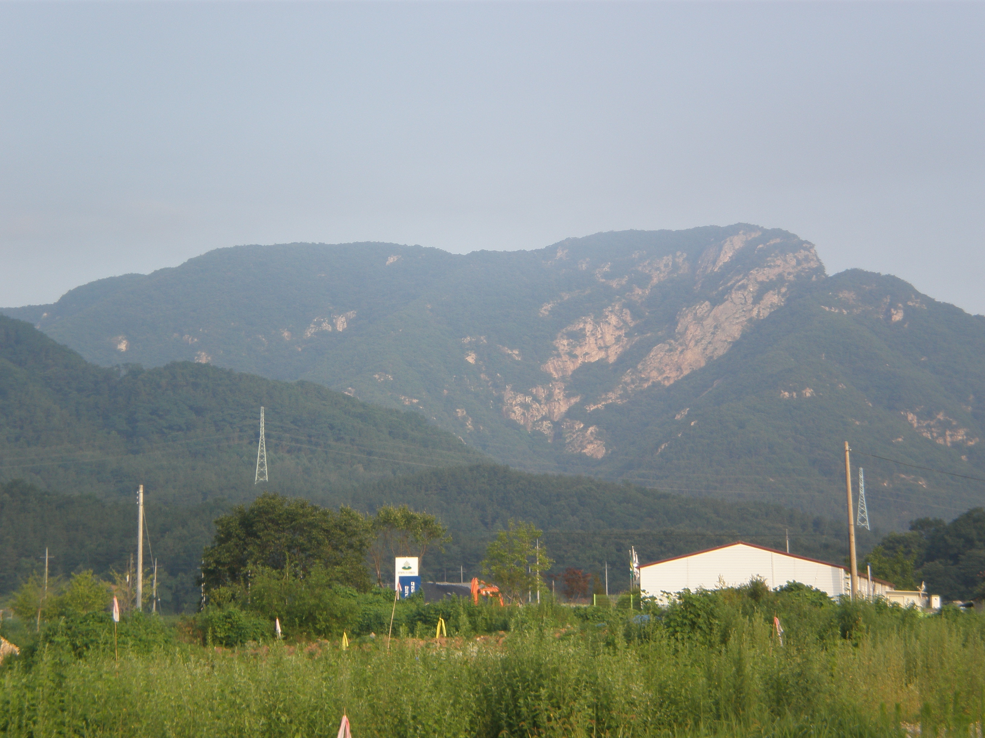 대전 학하동에서 본 계룡산 도덕봉